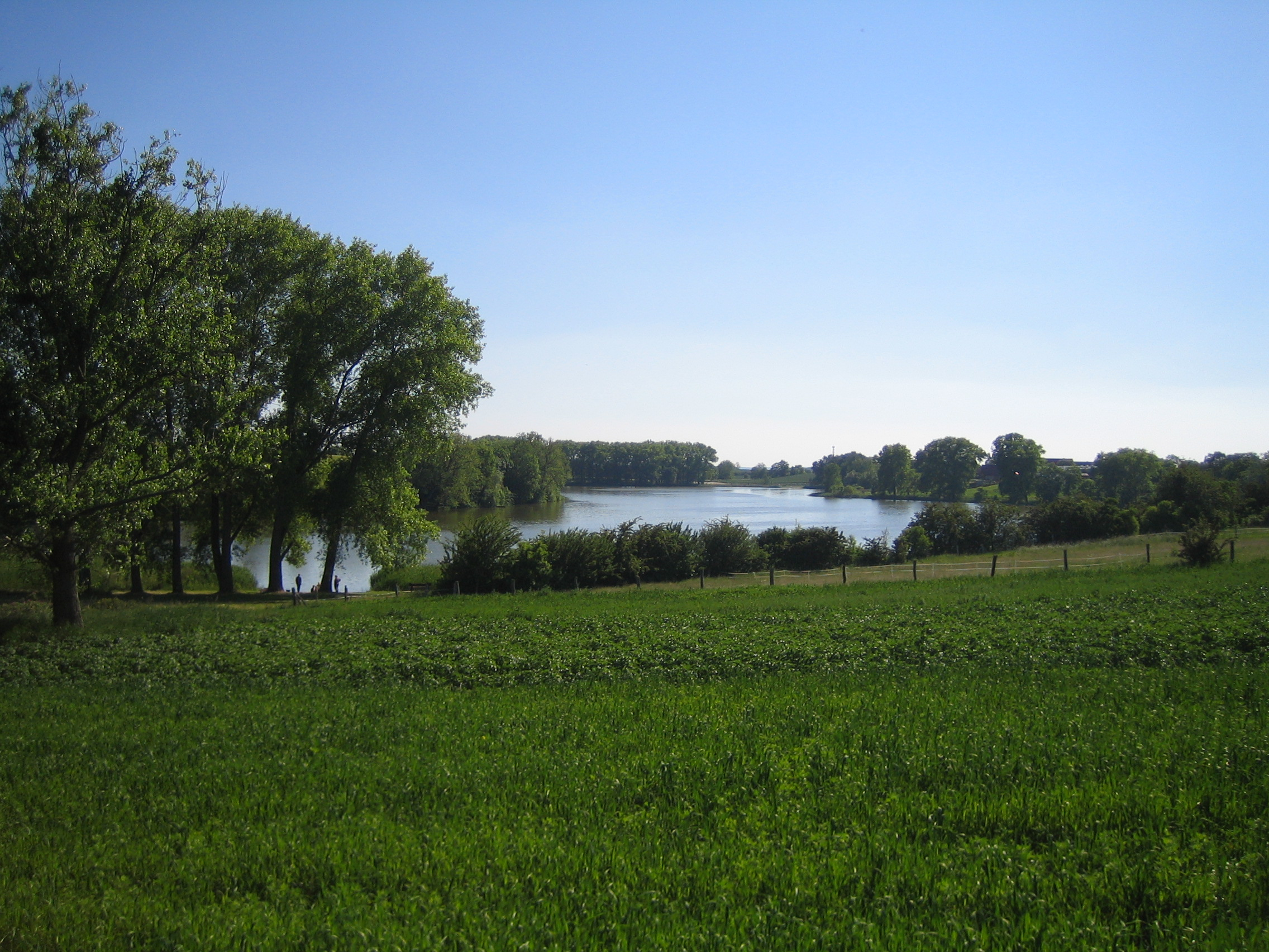 Grünower See vom Dorf aus (Nordseite).